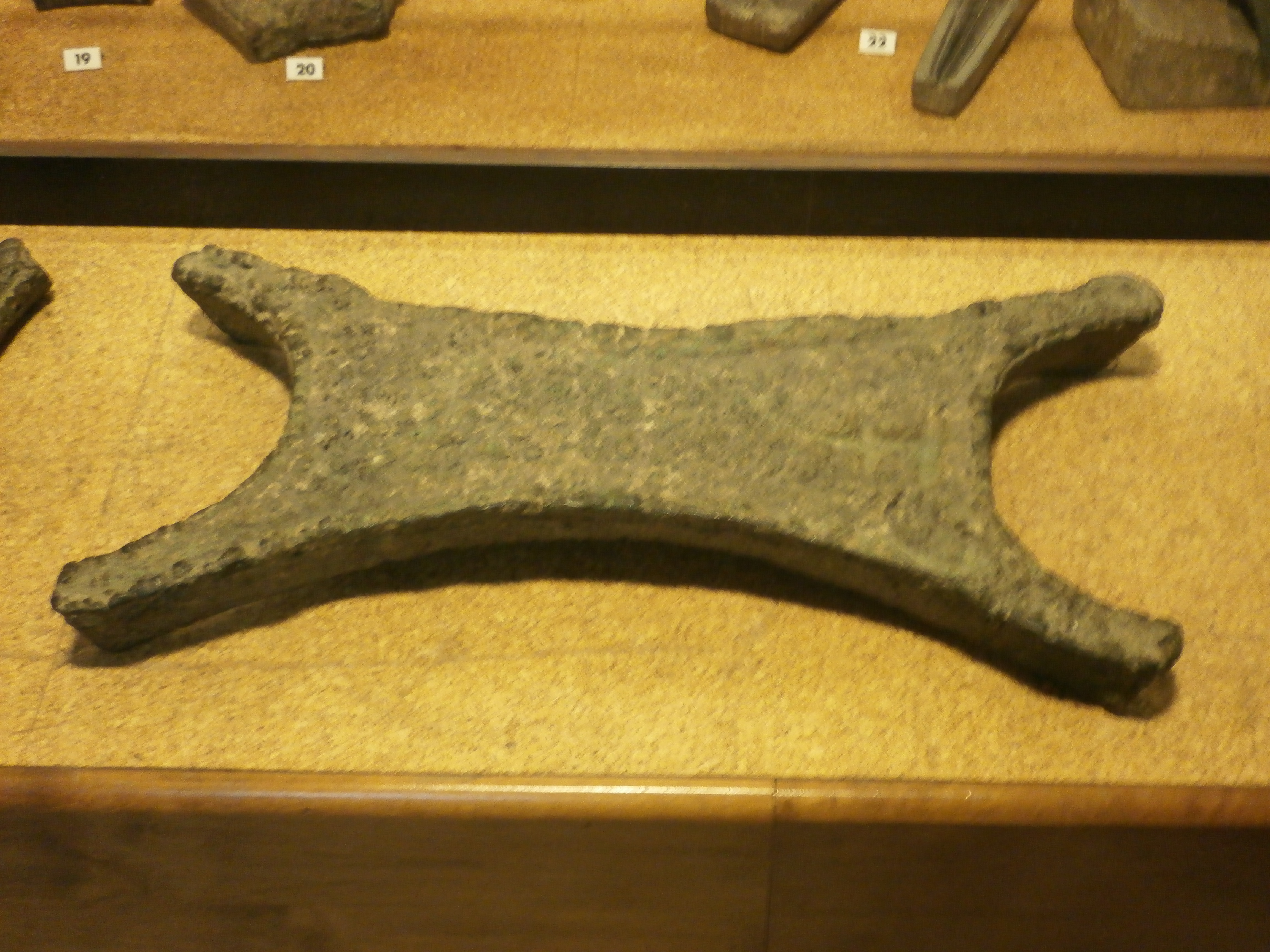 המוזיאון הארכאולוגי בקליארי